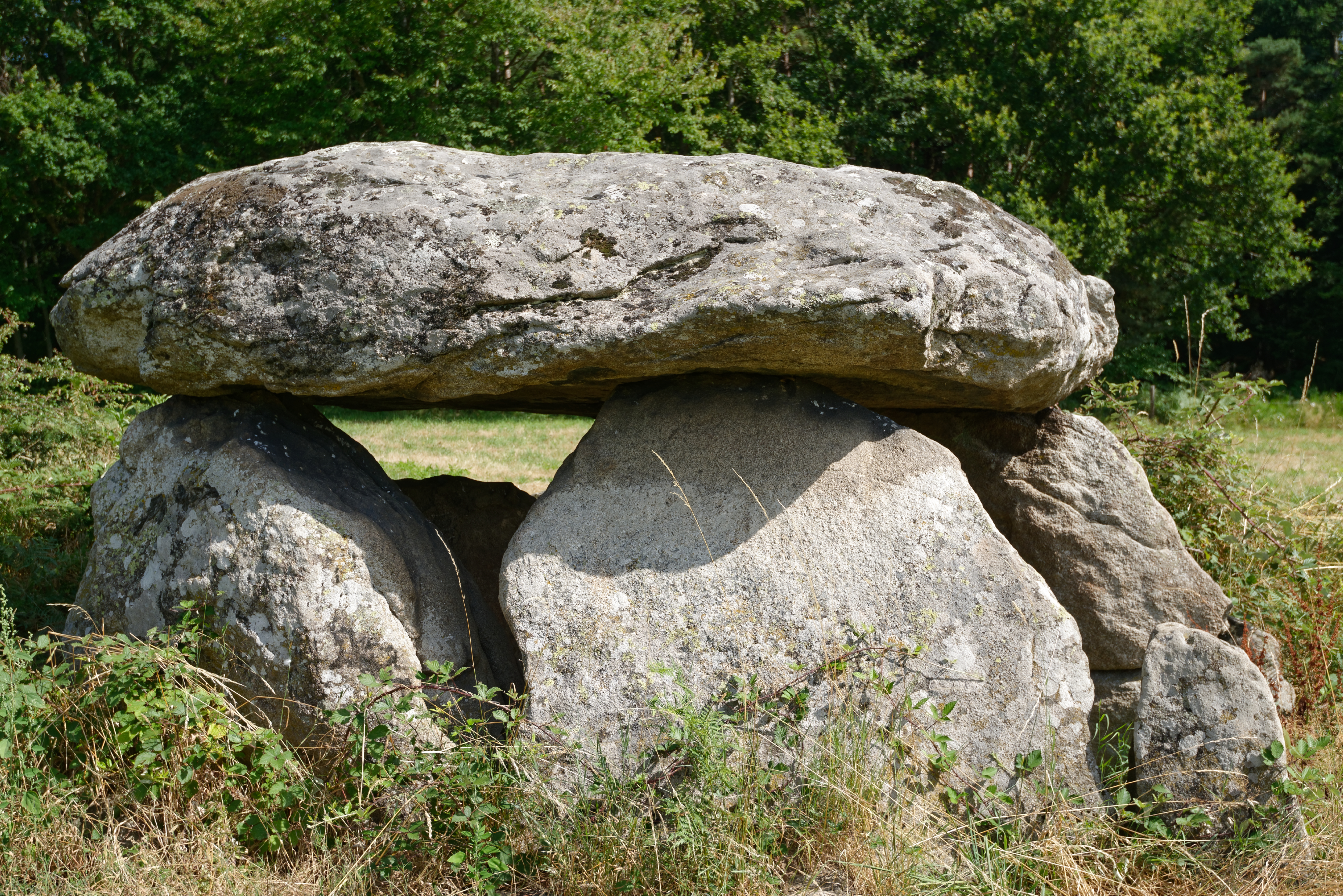 Le dolmen de Boisseyre, dit aussi de la Pierre Couverte, à Ambert (Puy-de-Dôme).